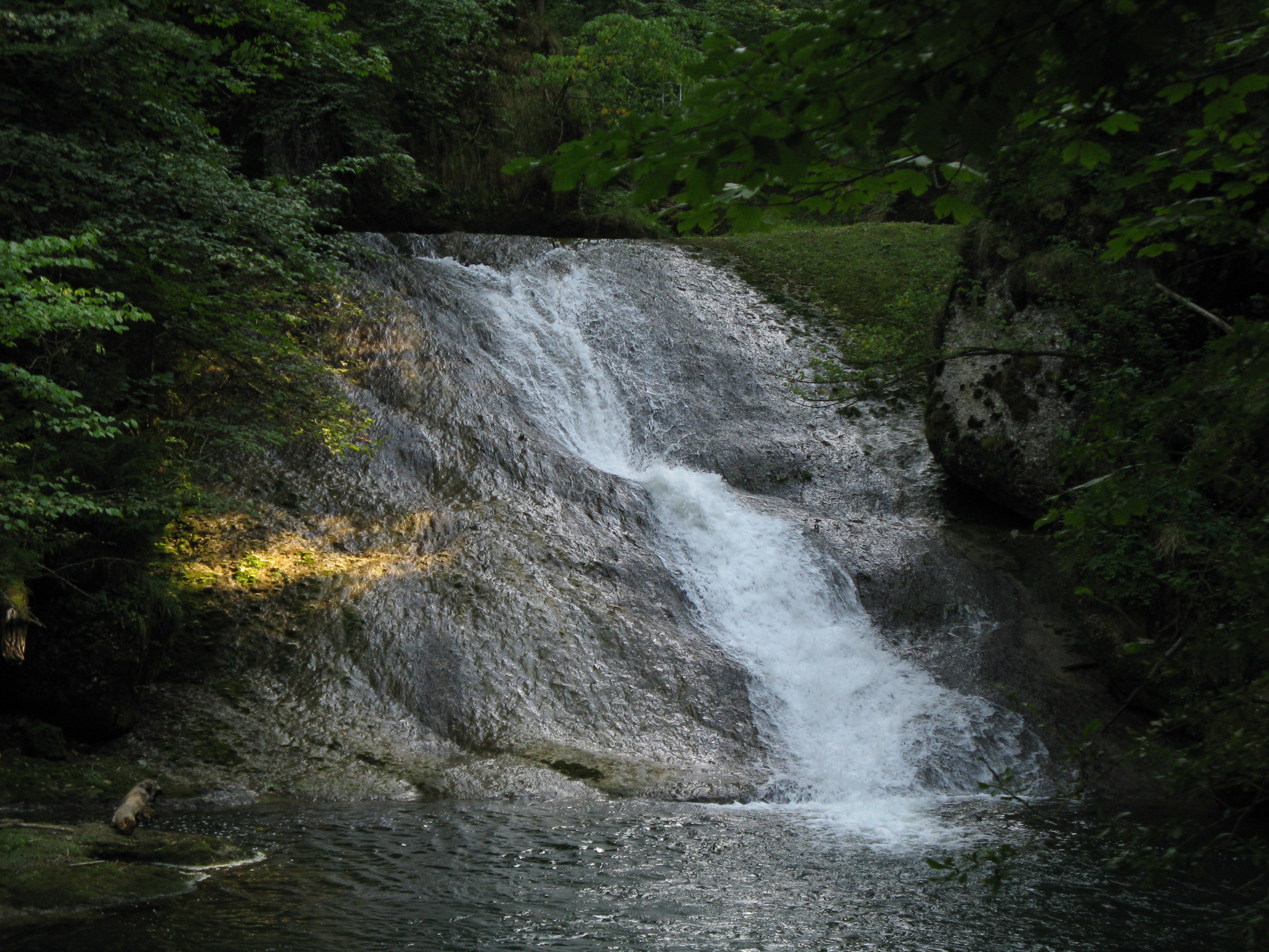 Wasserfall im Eistobel